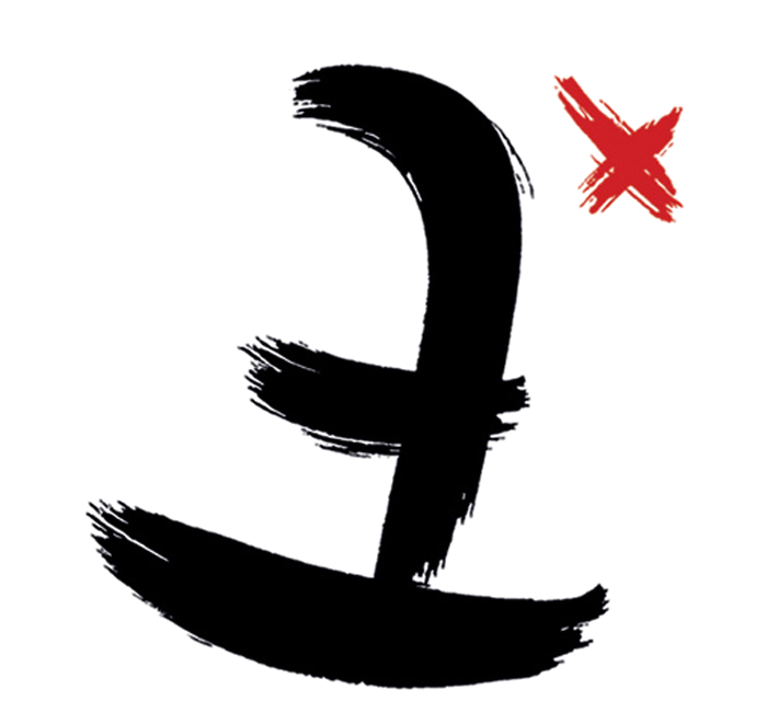 Suomen Sarjakuvaseura ry:n logo.